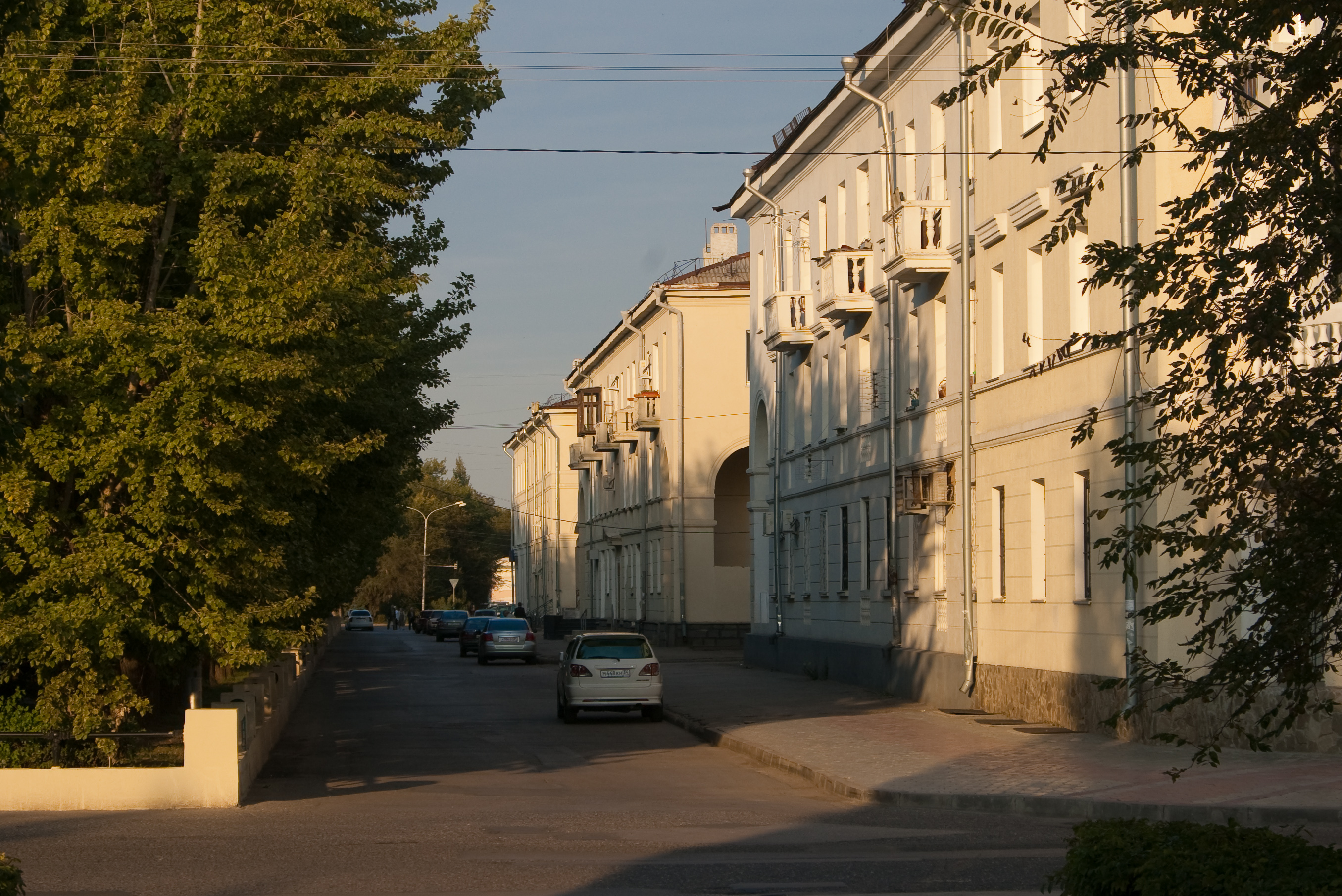 Вид на Фонтанную улицу от Мемориала гидростроителям